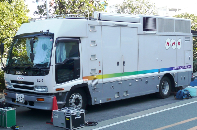 NHKの放送中継車。東京消防出初式にて撮影。